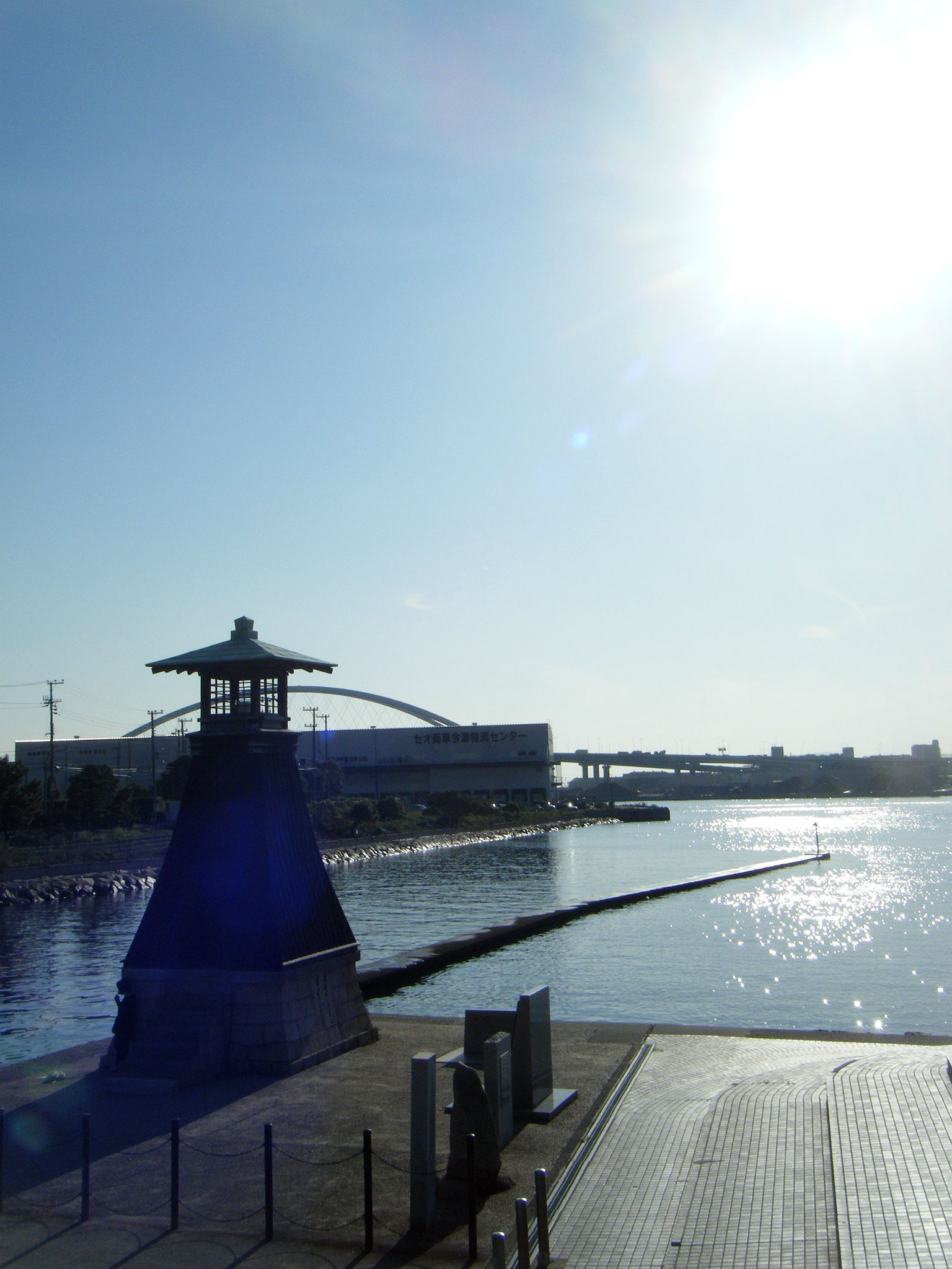 今津灯台 海側を望む 兵庫県西宮市